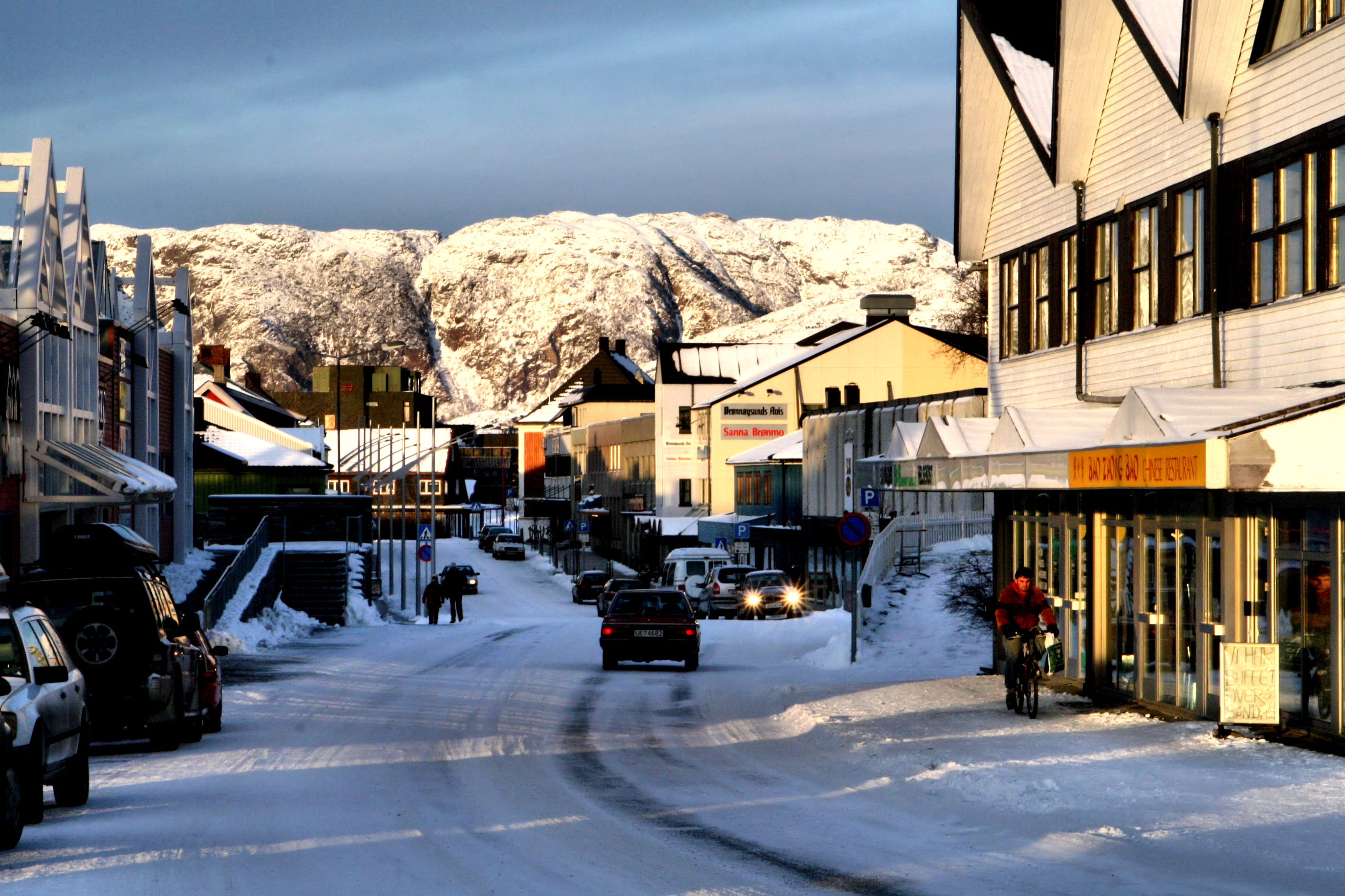 Main street (Riksvei 17) in Brønnøysund. Winter 2005-2006.